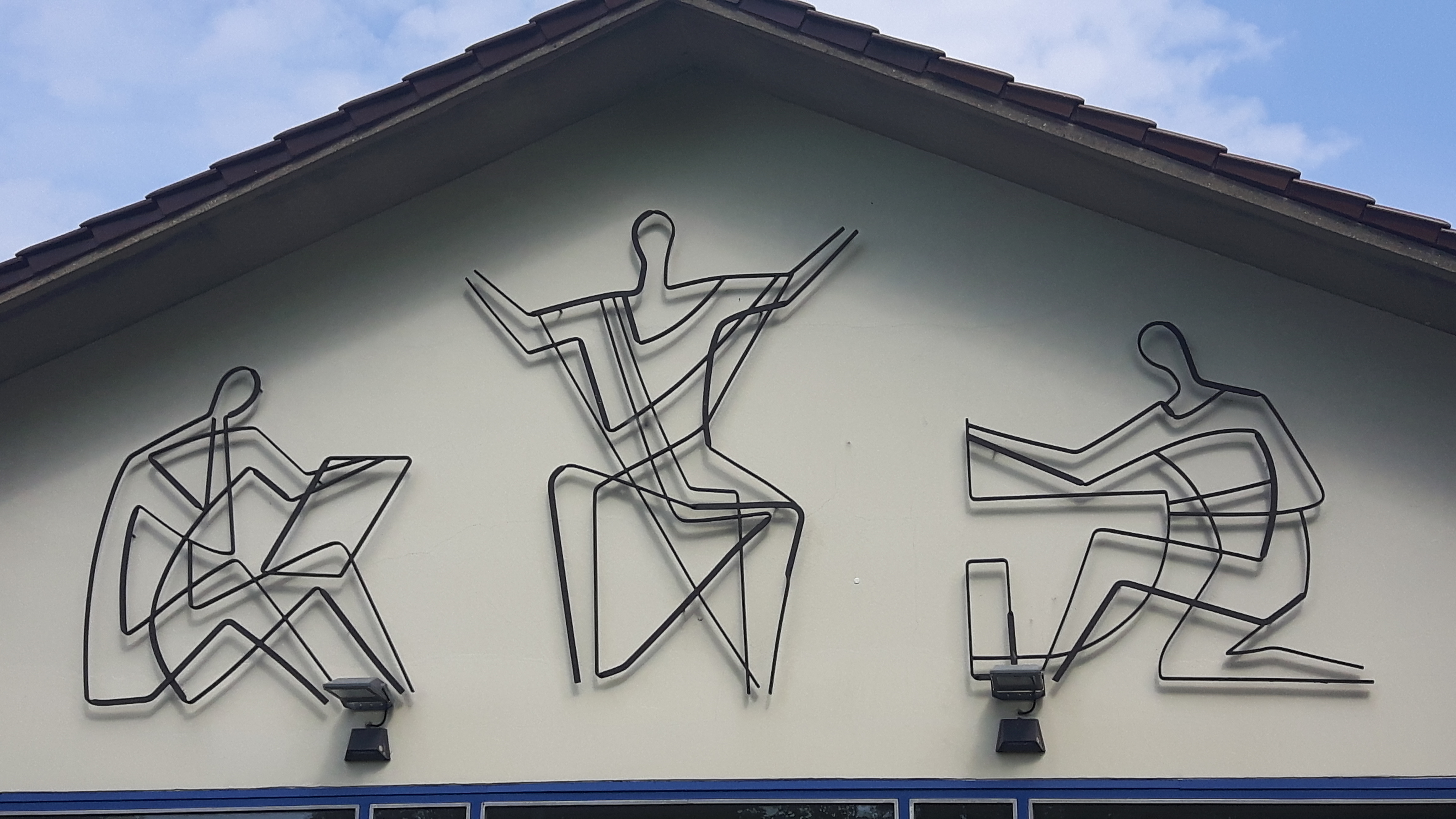 Eisenbandplastik am Haupteingang des Gymnasiums Neue Oberschule in Braunschweig. Werk der Künstlerin Hedwig Horneburg.